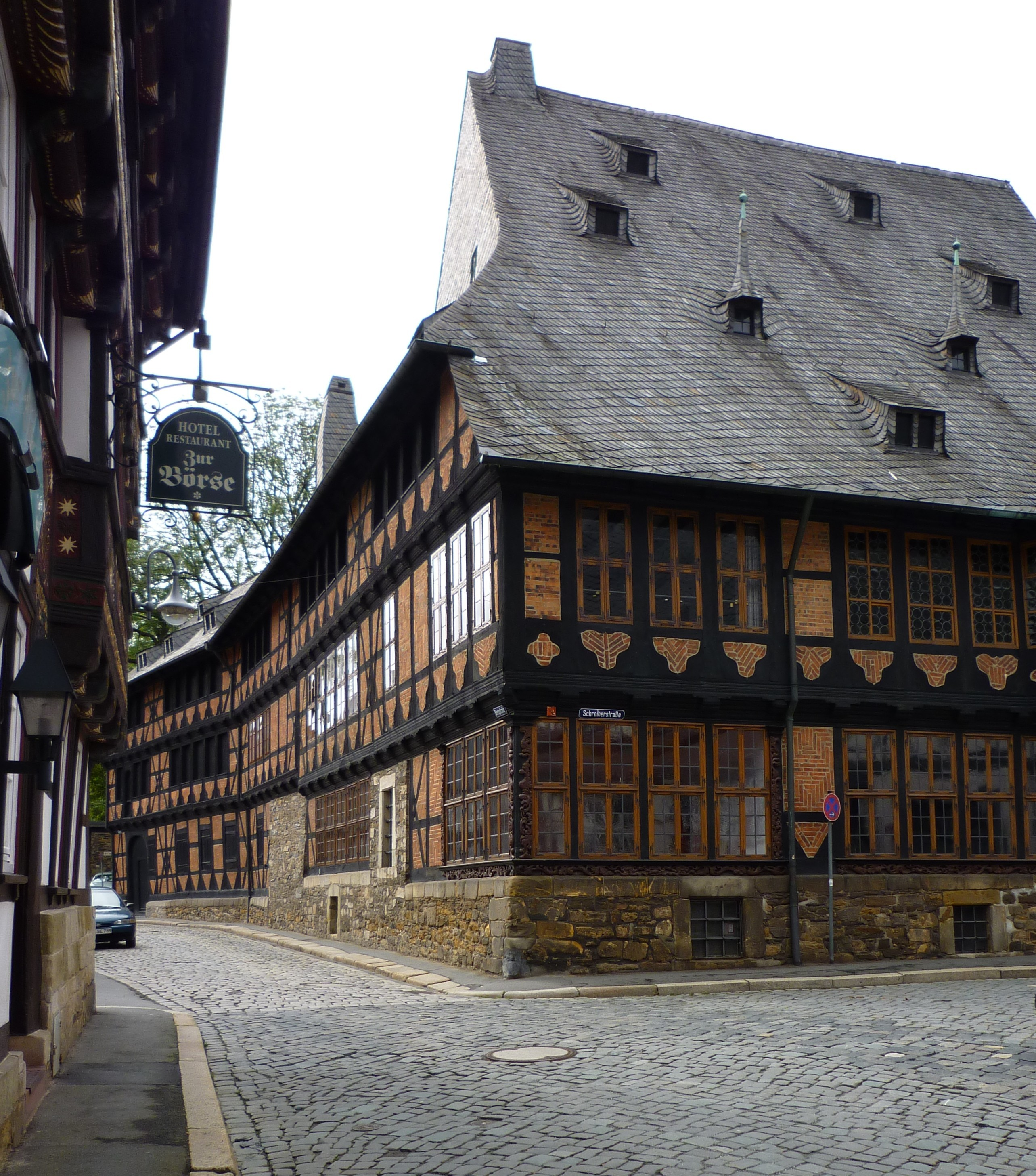 Goslar -Siemenshaus aus 1693